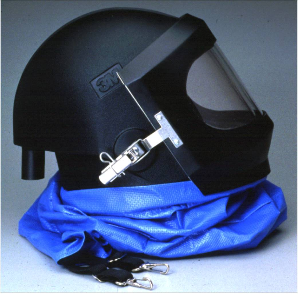 Шлем 3М от респиратора с принудительной подачей воздуха